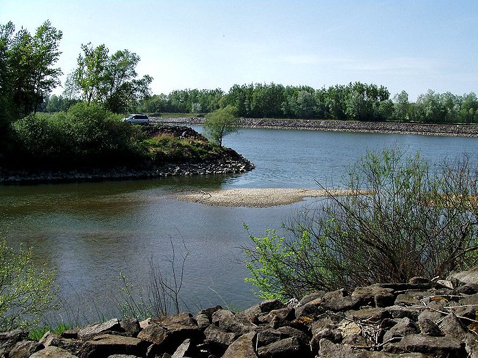 Mündung des Innbachs in die Donau